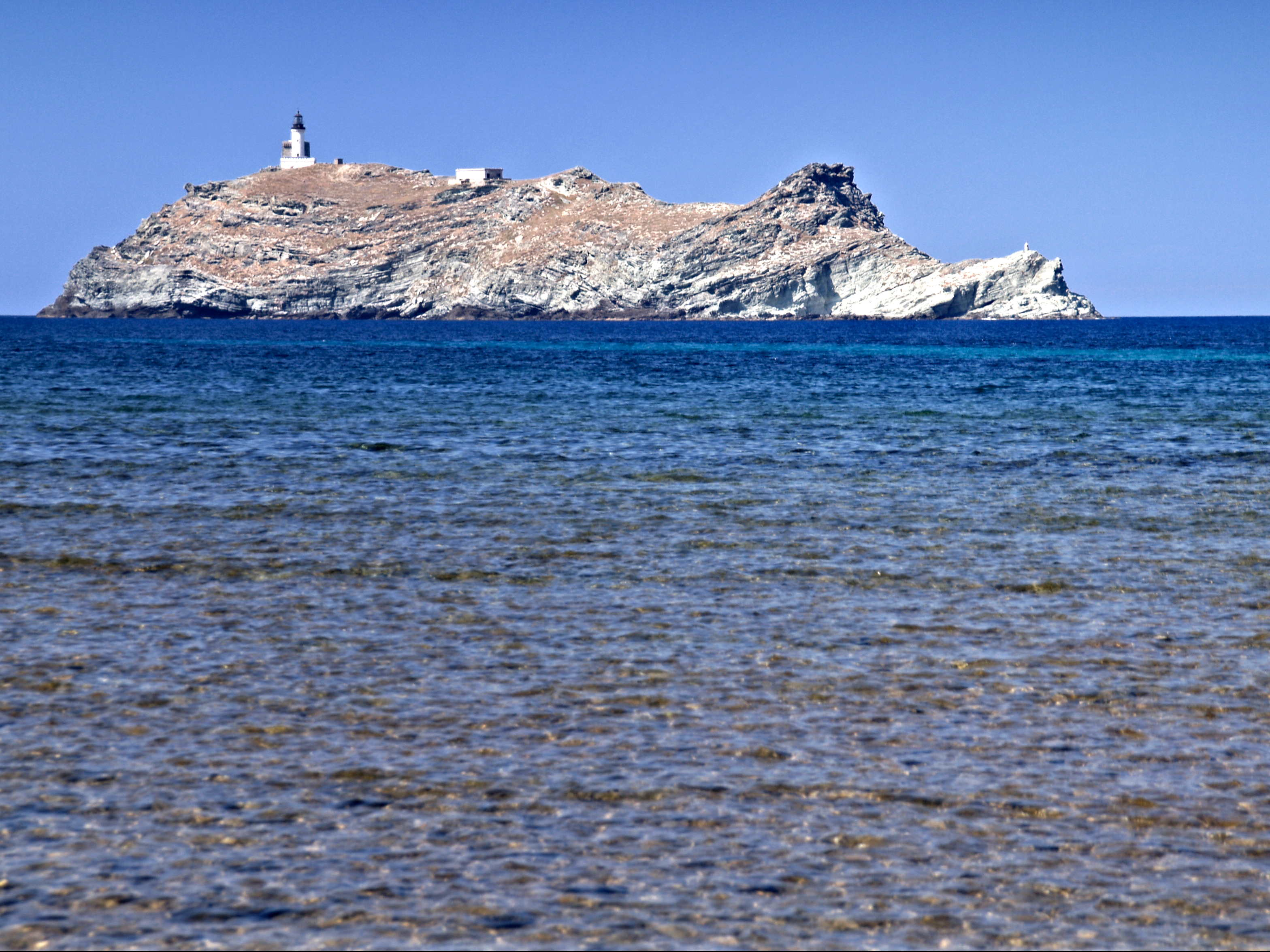 Ersa (Corsica) - Île de la Giraglia